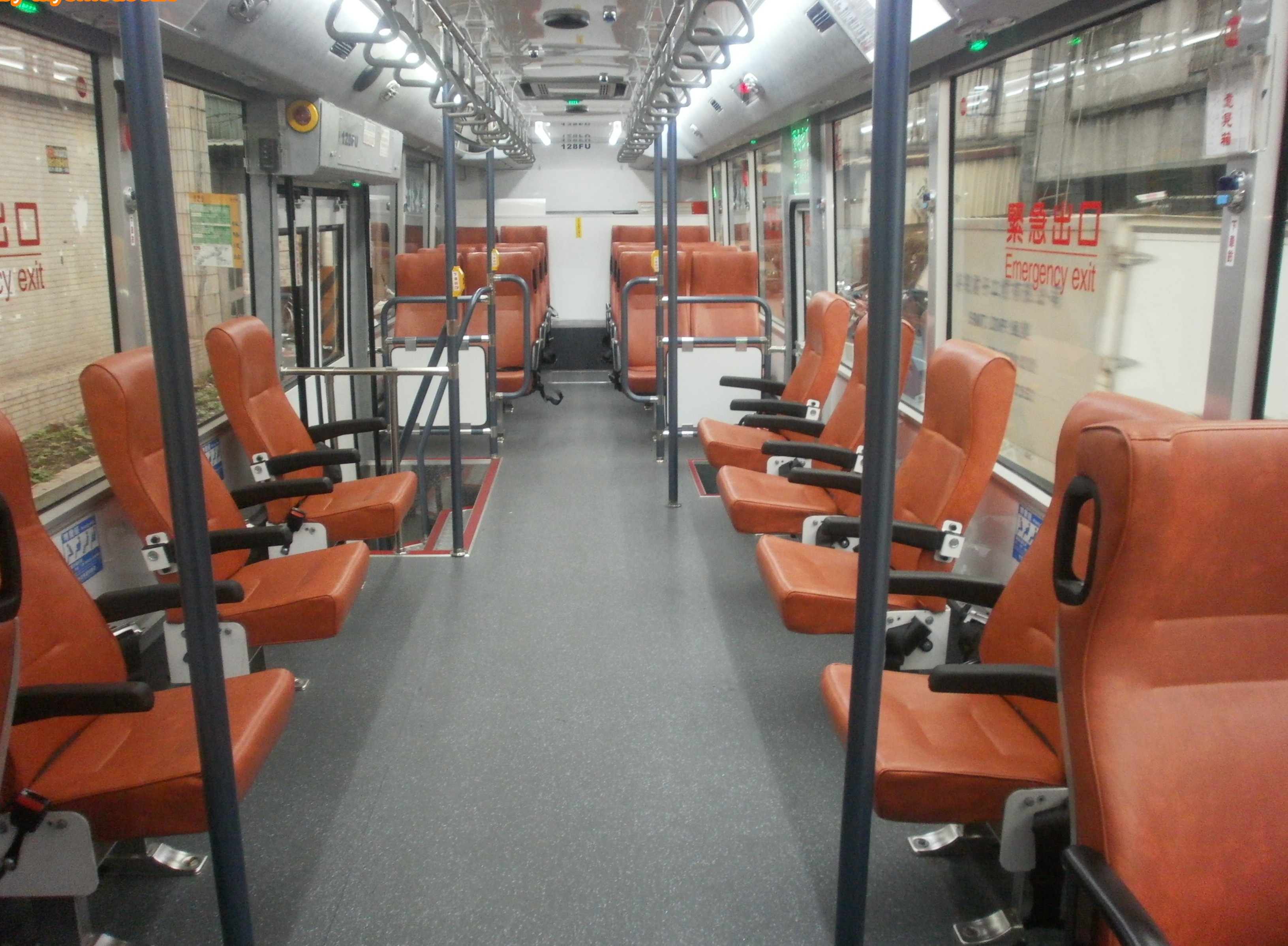 台北客運大型復康巴士128-FU內裝(由前往後拍)